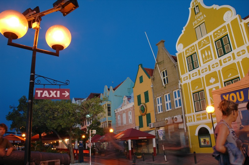 Willemstad